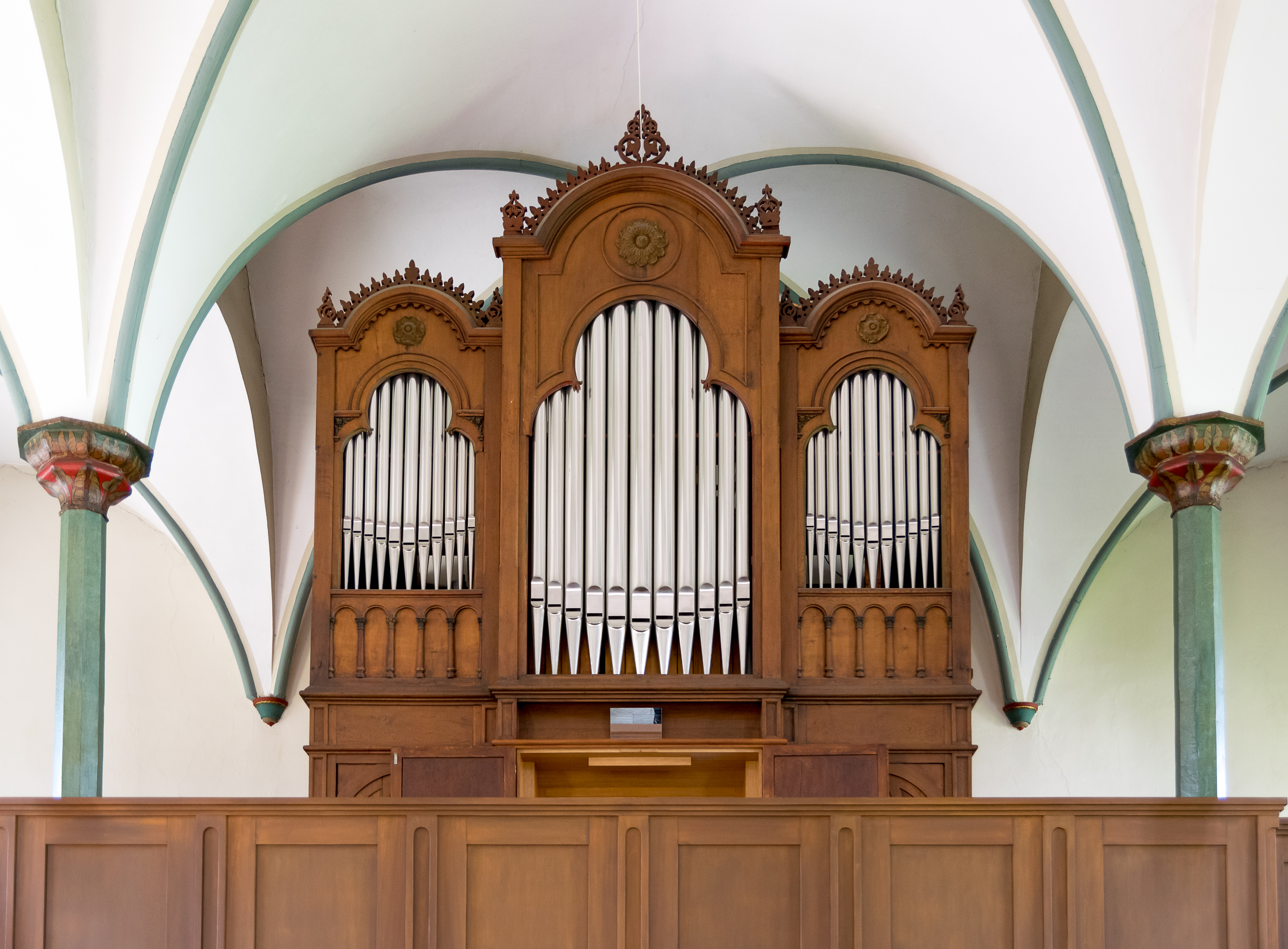 Orgel von 1879 der Firma Furtwängler & Söhne, evangelisch-reformierte Kirche Schlangen